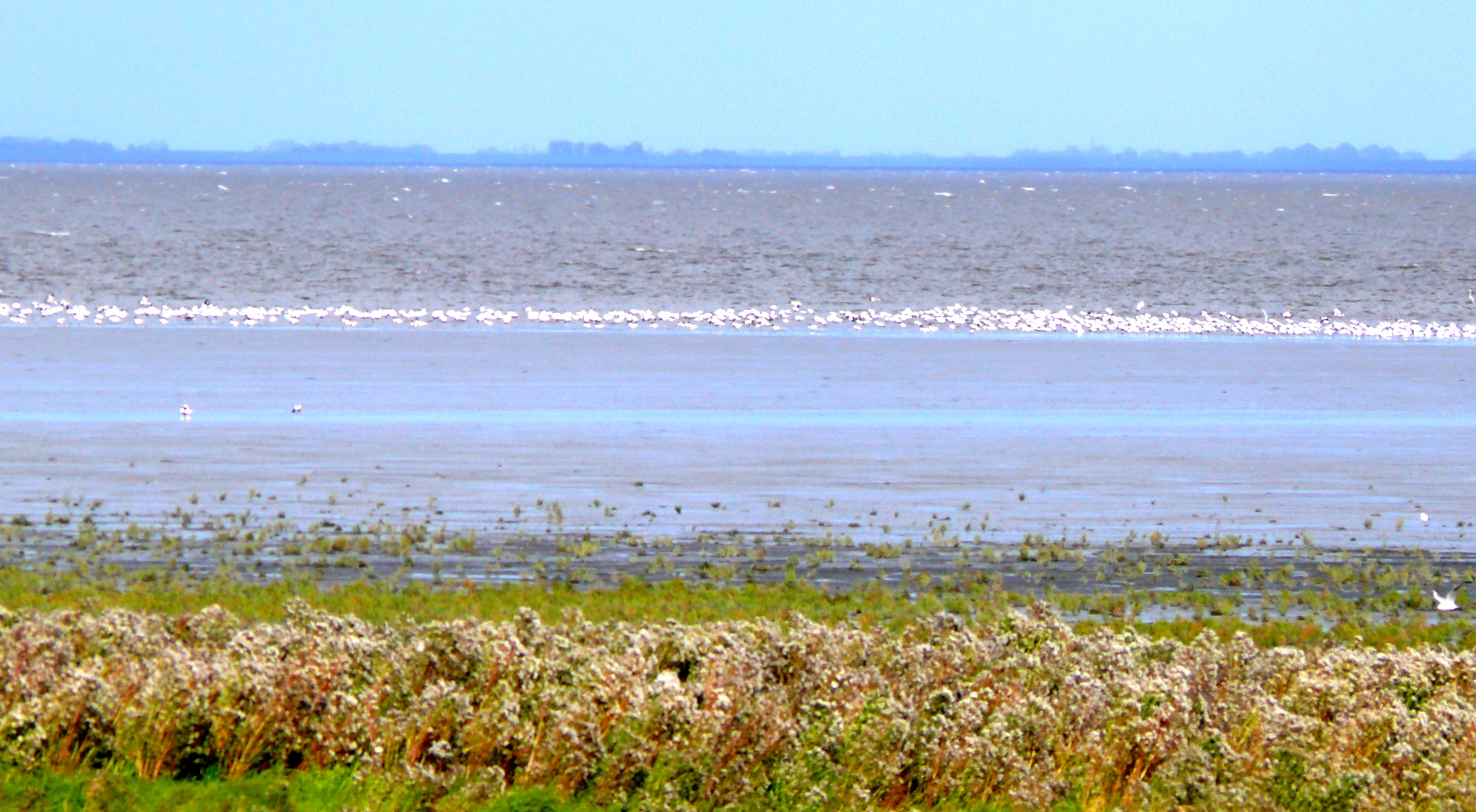 Vogelschwärme am Vareler Hafen / Jadebusen